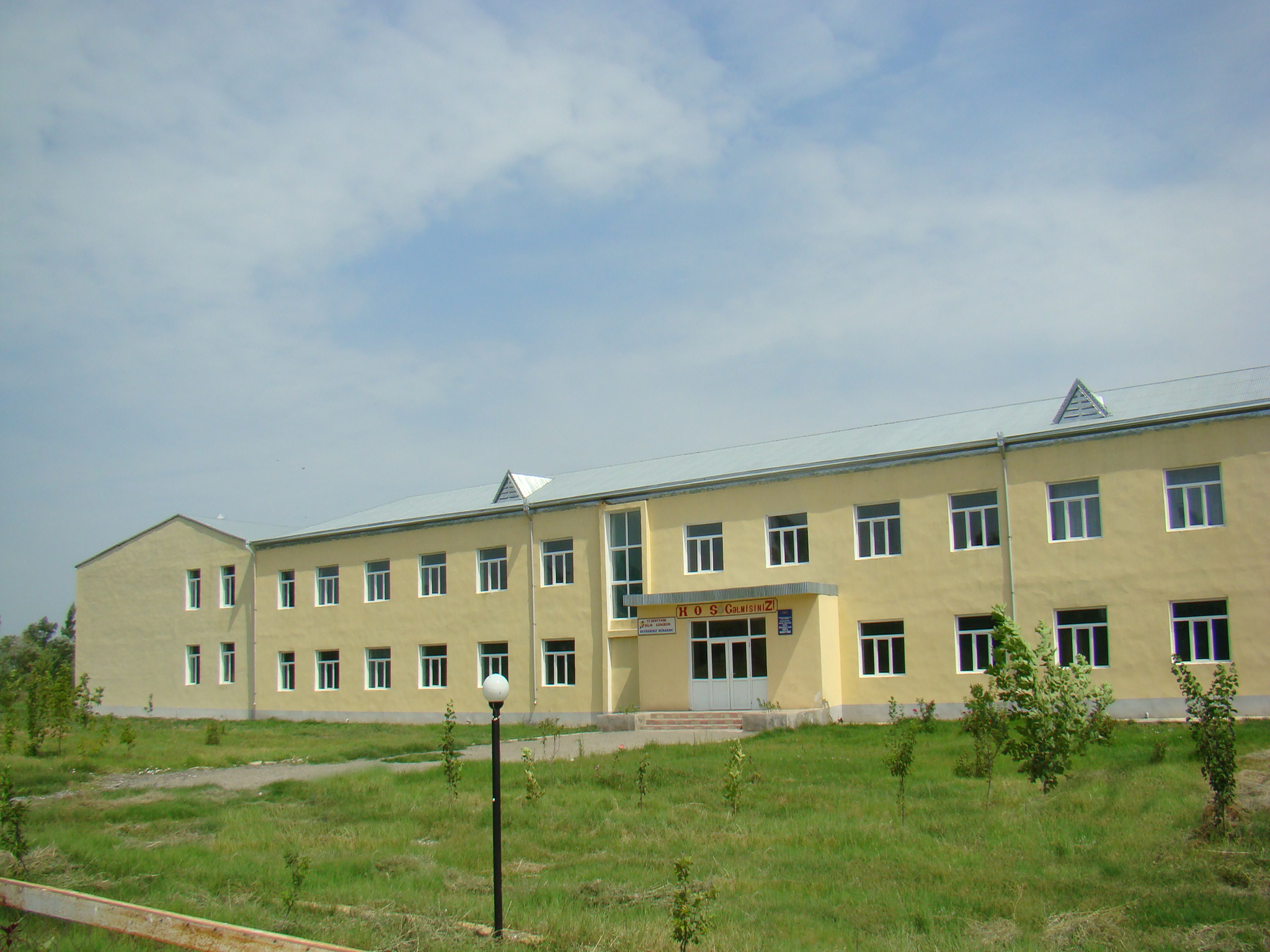 Bərdə rayonu Gülgəzli kənd orta məktəbi